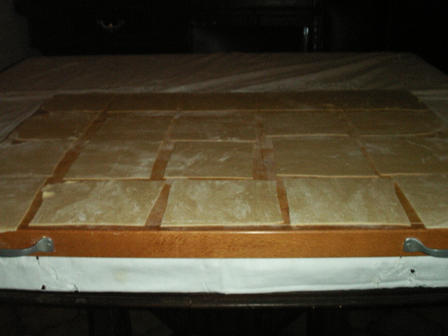 Lasagne pasta fresca